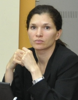 Laura Alfaro Maykall, Ministra de Planificación Nacional y Política Económica de Costa Rica, Administración Chinchilla Miranda 2010-2014.